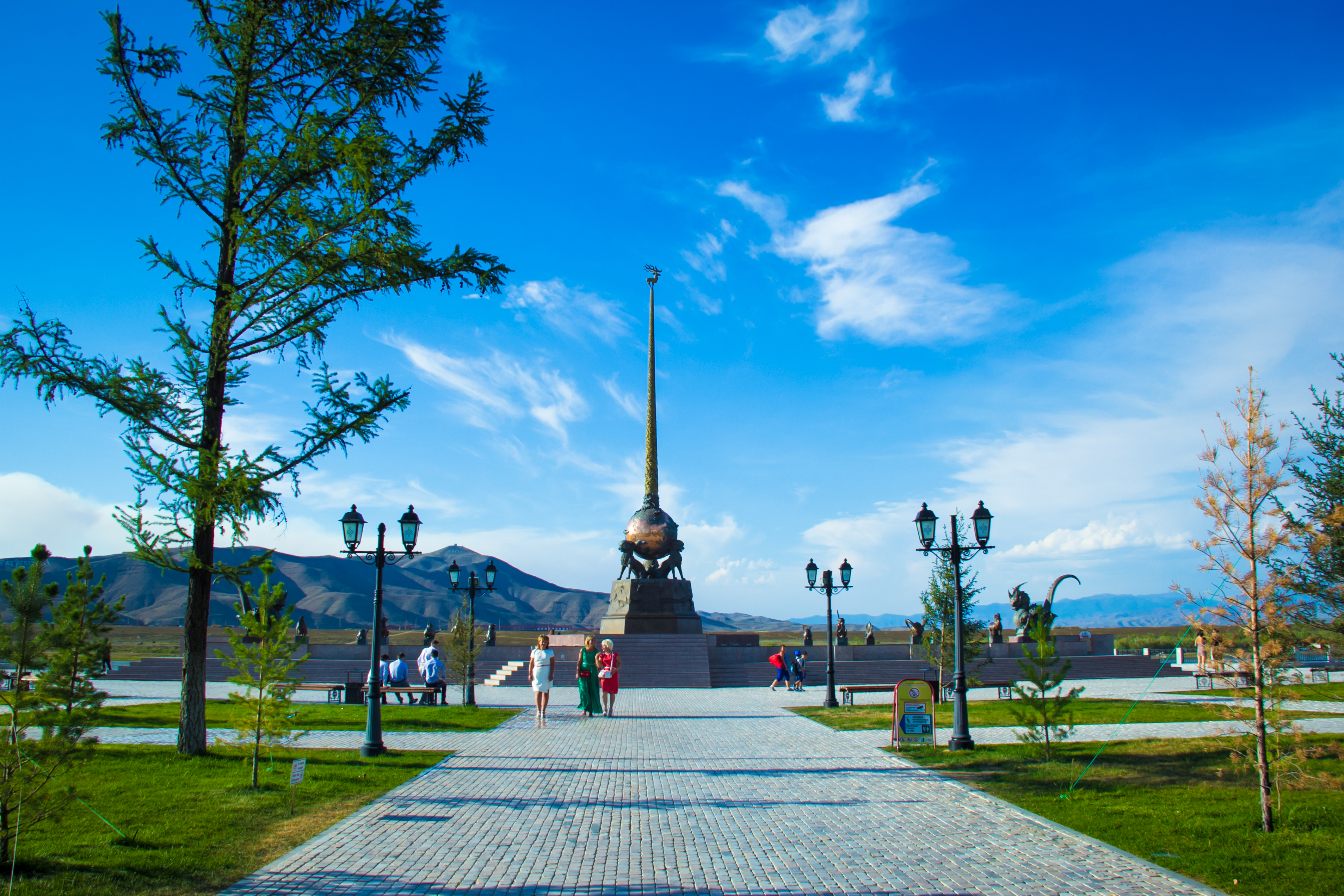 Географический Центр Азии